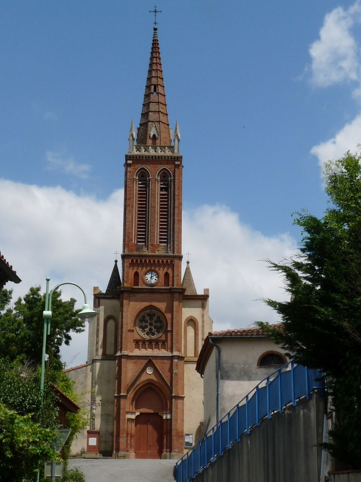 Eglise de Ségreville, Haute-Garonne, France